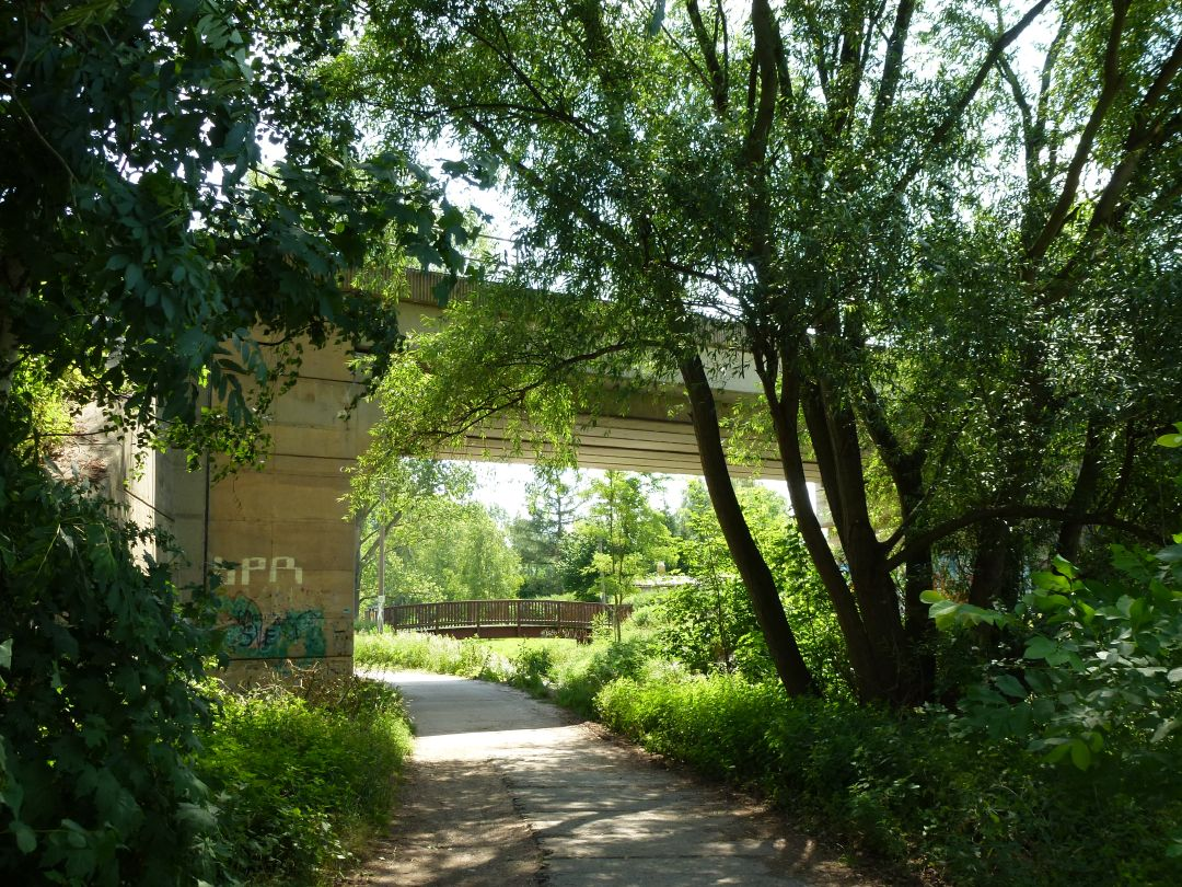 Eisenbahn- und Fußgängerbrücke über die Parthe am Rande Cradefelds